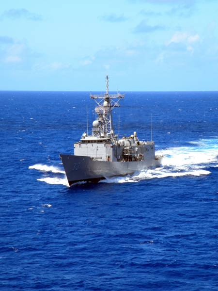 USS Jarrett (FFG-33)